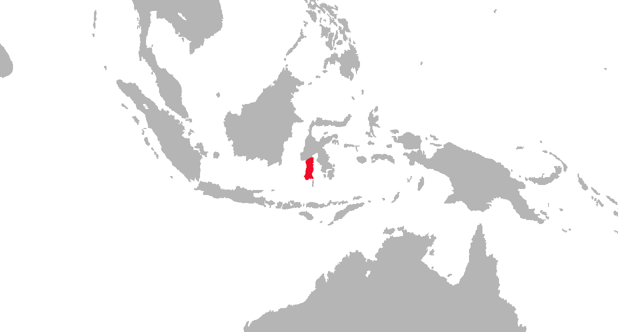 Carte de répartition du macaque maure. Etablie par Christophe Chauvin.